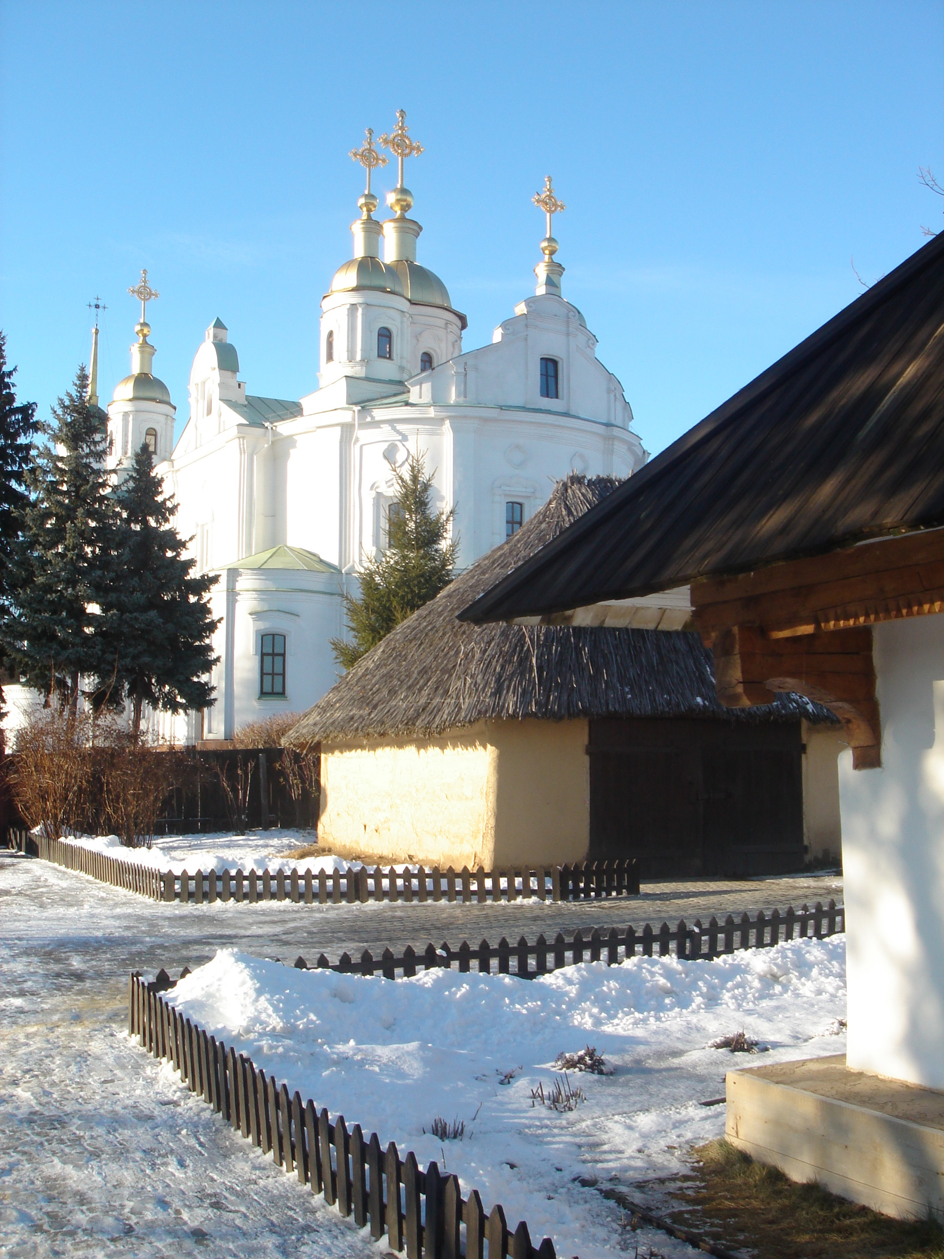 Вид на Успенский собор из усадьбы И.Котляревского Беларуская (тарашкевіца): Краявід сабору Ўсьпеньня Прасьв. Багародзіцы зь сядзібы І. Катлярэўскага